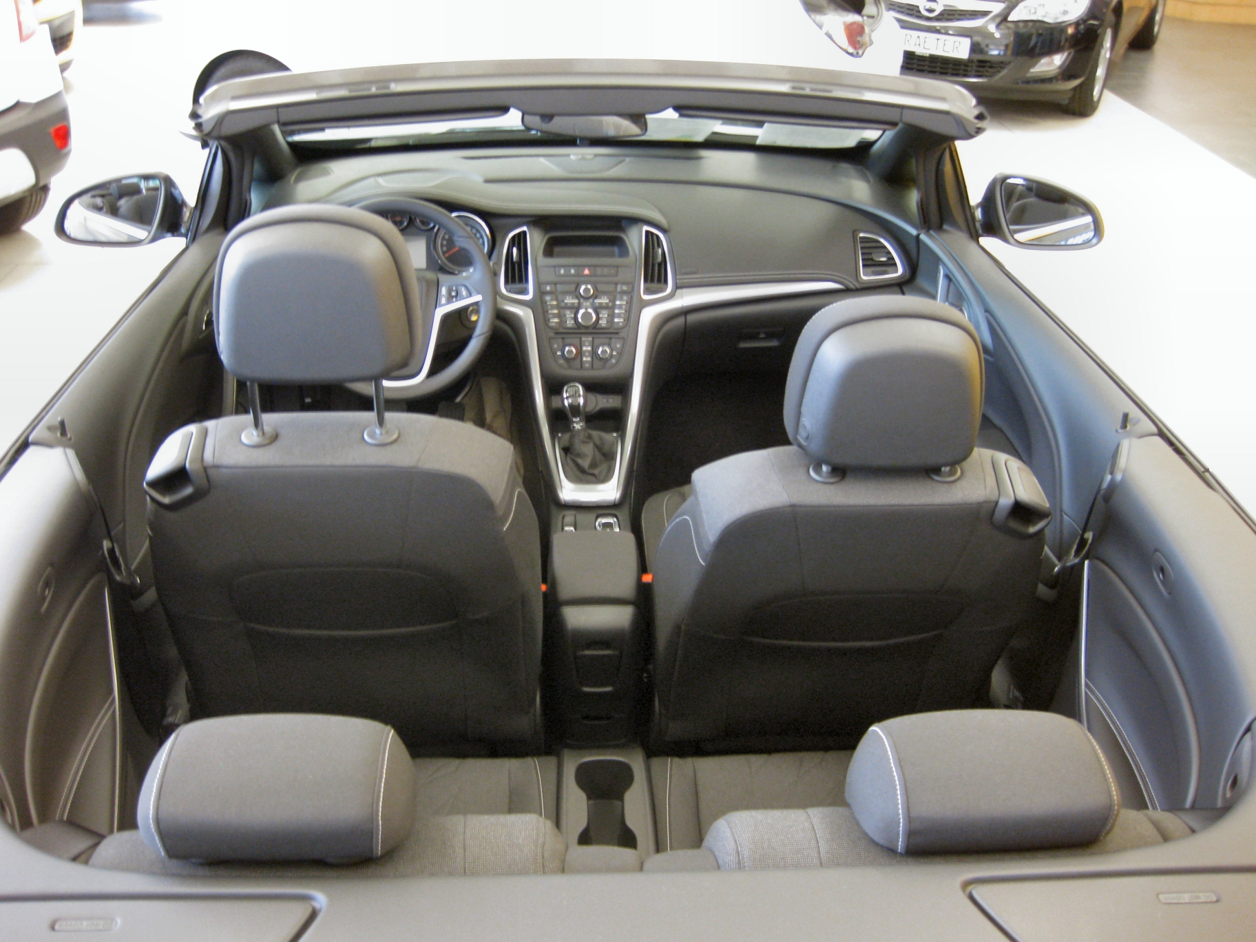 Opel Cascada Innenraum